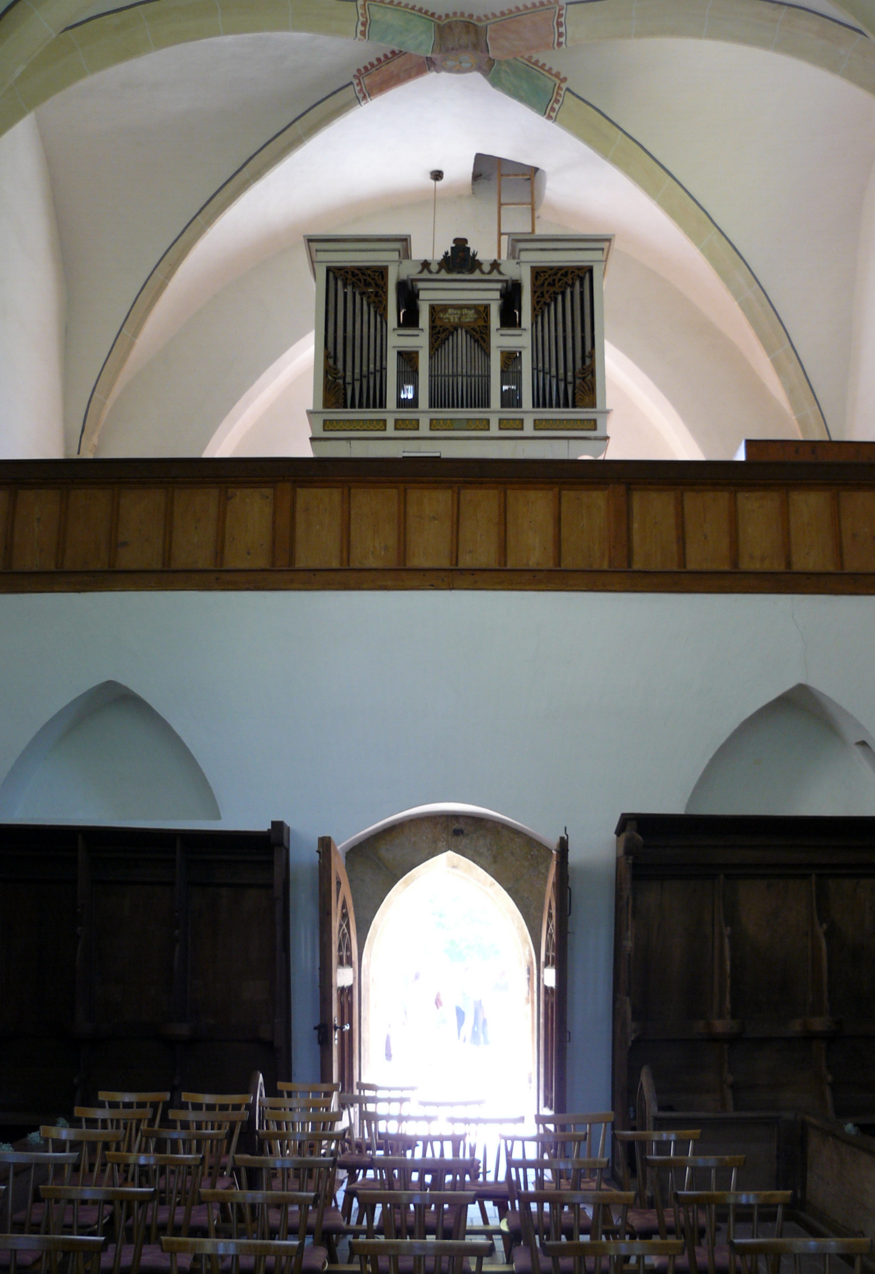 Orgel der Klosterkirche Christgarten